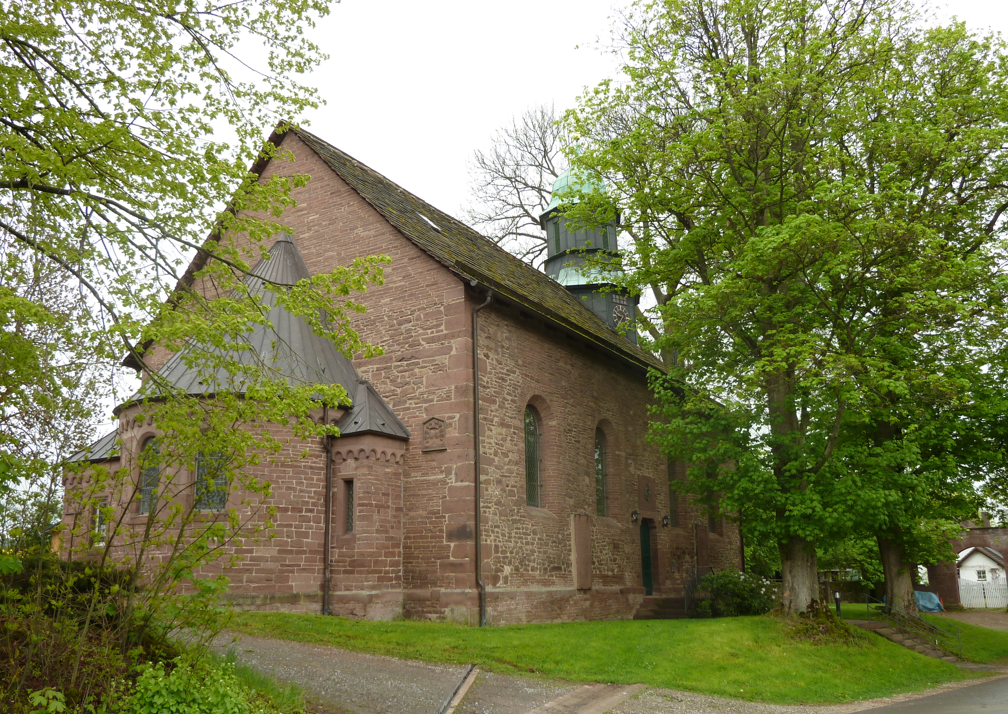 Ev.-luth. Kirche St. Nicolai in Deensen, Landkreis Holzminden, Niedersachsen. Die Kirche ist dem Gutshof angegliedert